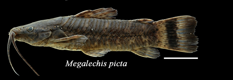 Megalechis picta, barra escala: 1 cm. Bosque Nacional de Tapajós, Brasil. Silva-Oliveira C, Canto ALC, Ribeiro FRV (2016) Stream ichthyofauna of the Tapajós National Forest, Pará, Brazil. ZooKeys 580: 125-144.